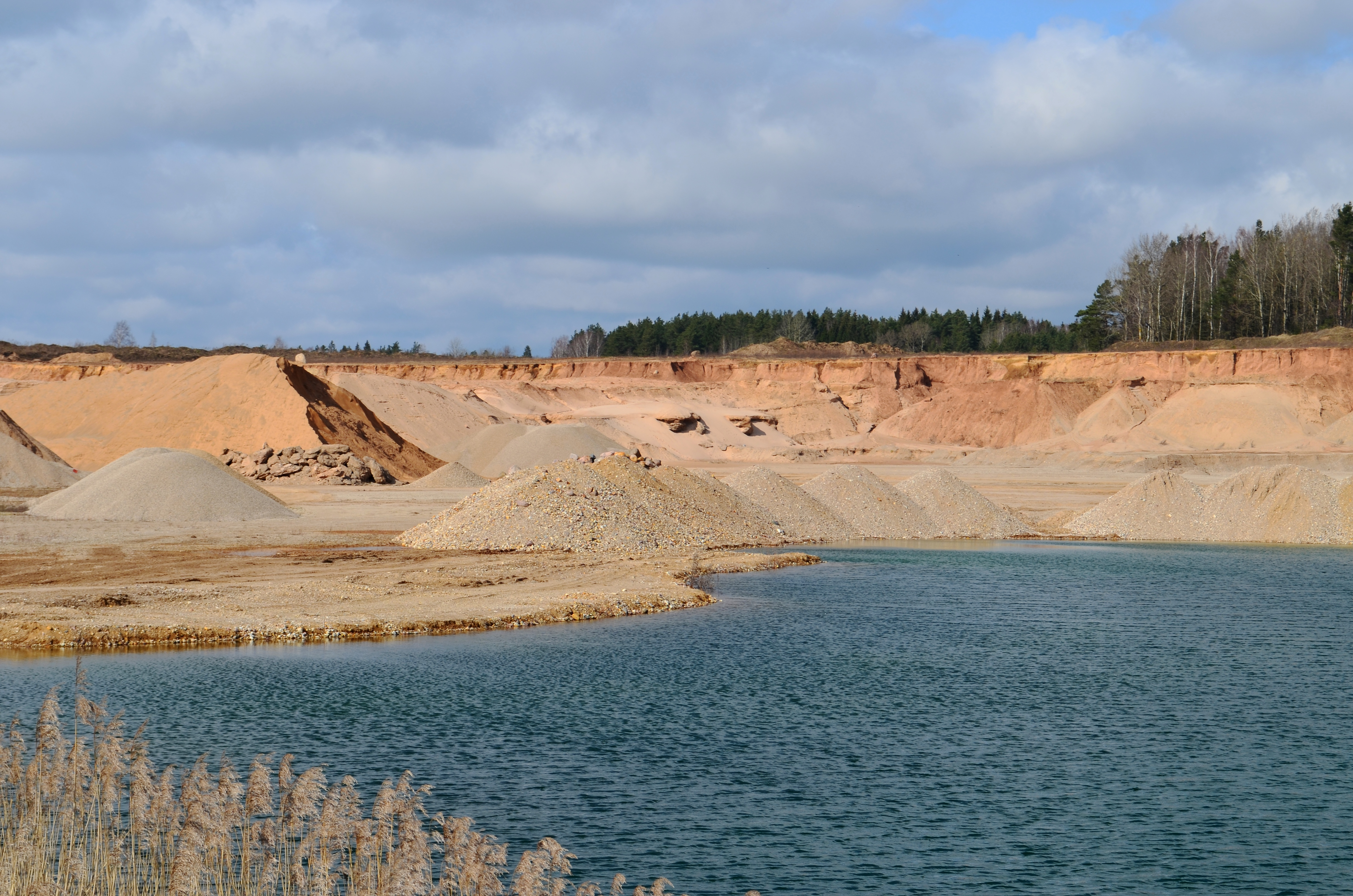 Kurklių karjeras, Anykščių raj.